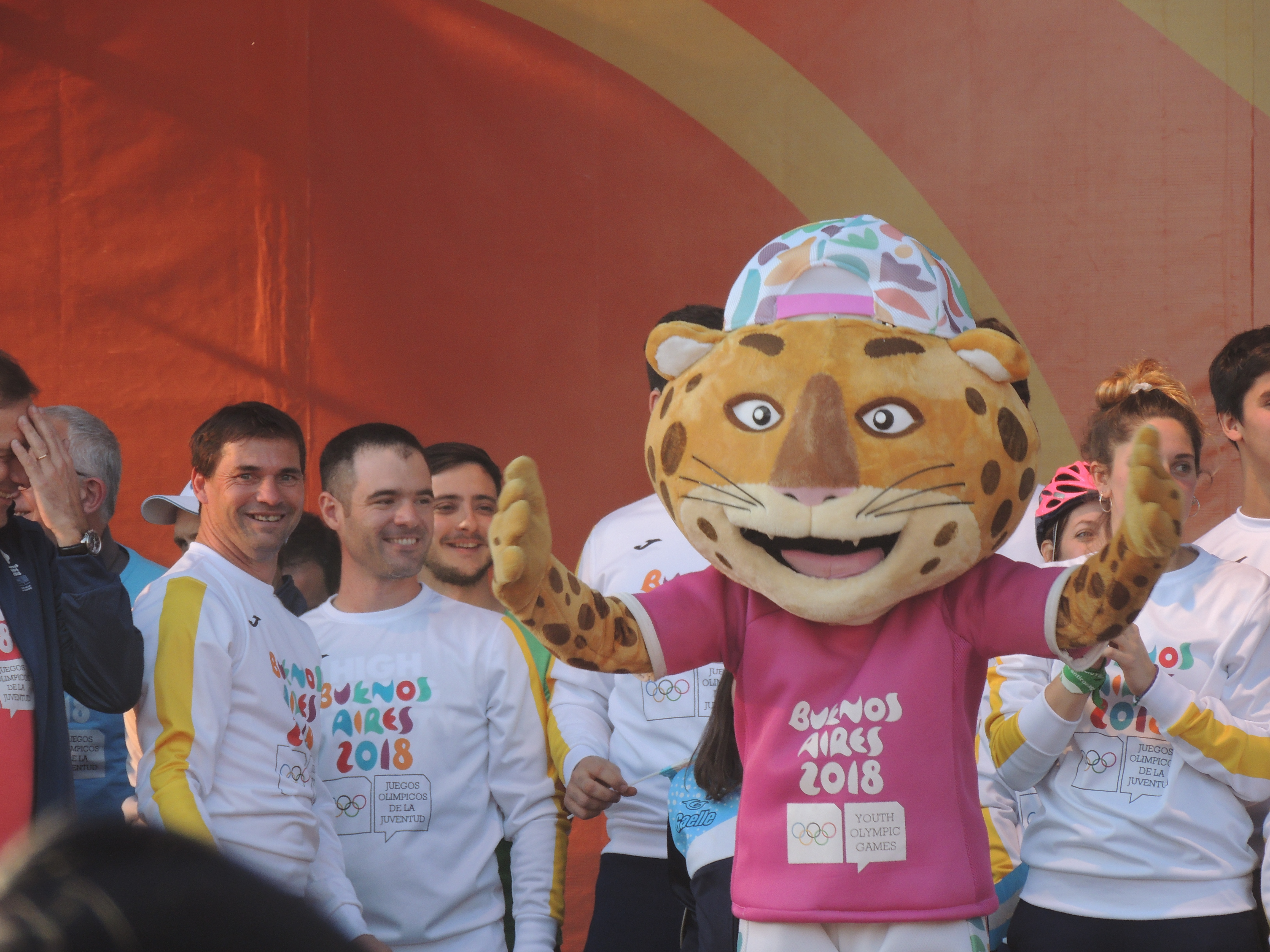 Pandi